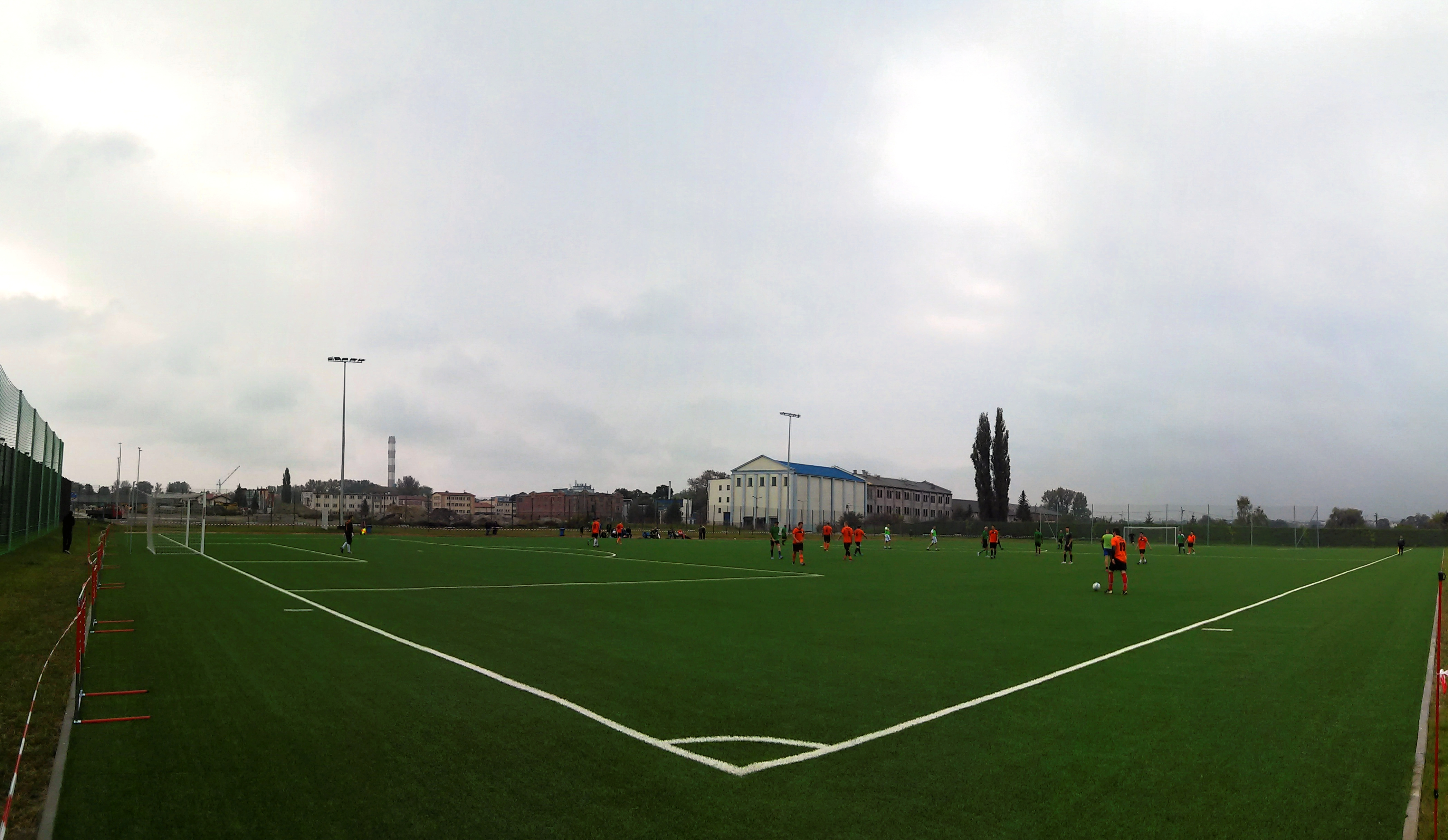 Arena Lublin podczas XI Lubelskiego Festiwalu Nauki.